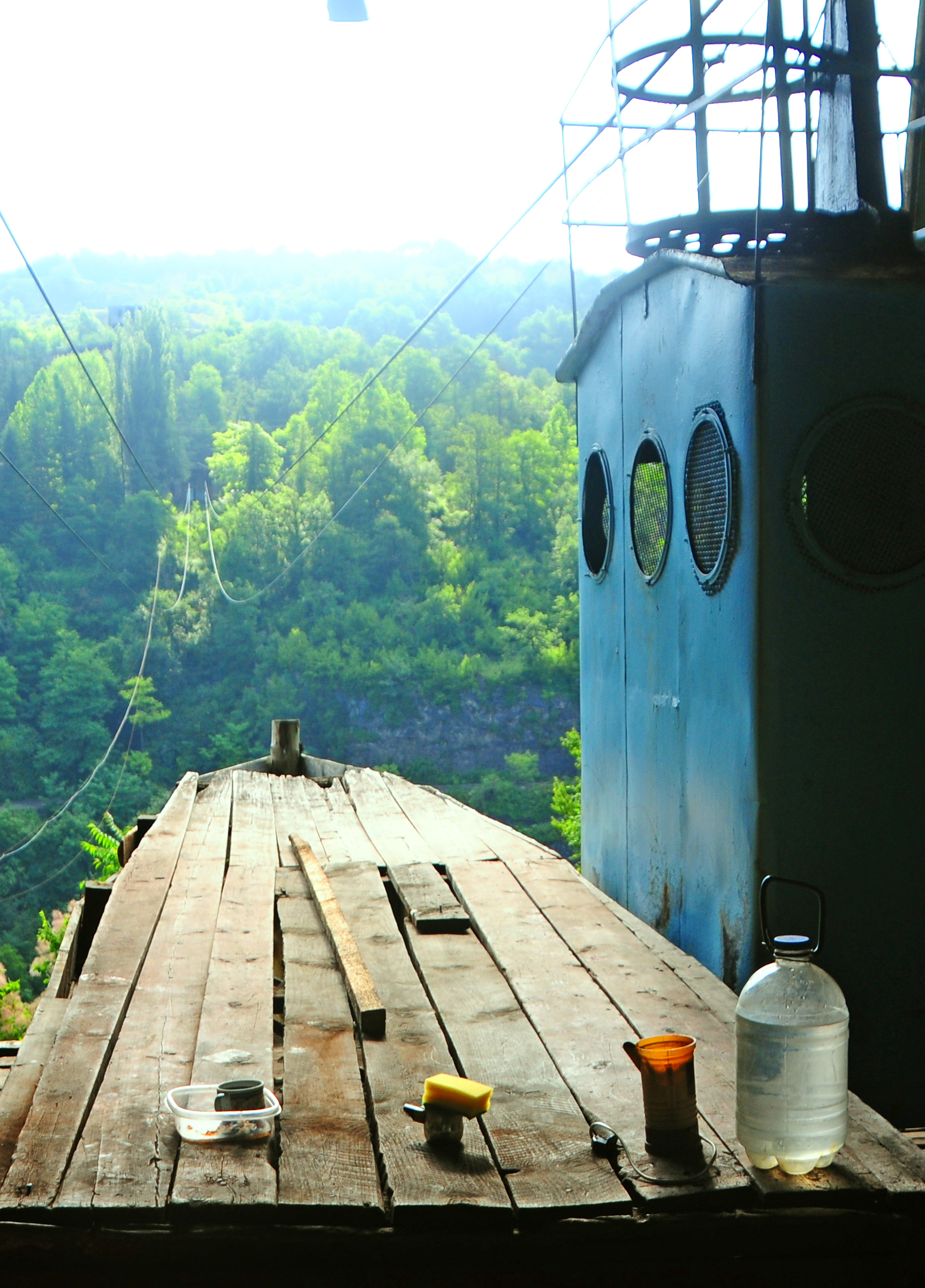 Chiatura